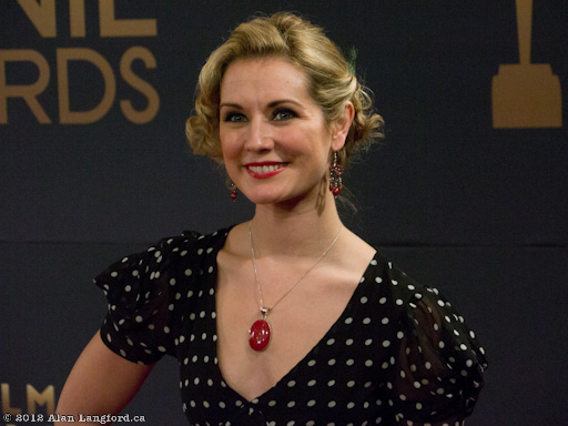 Natalie Lisinska, Genie Awards 2012